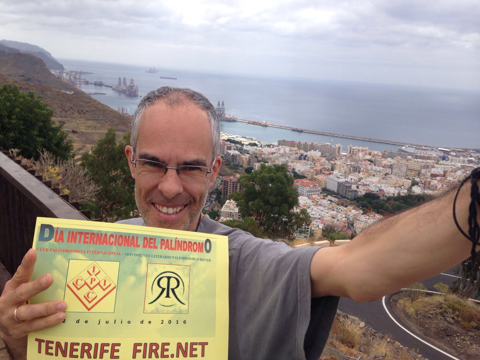 Carlos Felipe Martell y el Día del Palíndromo